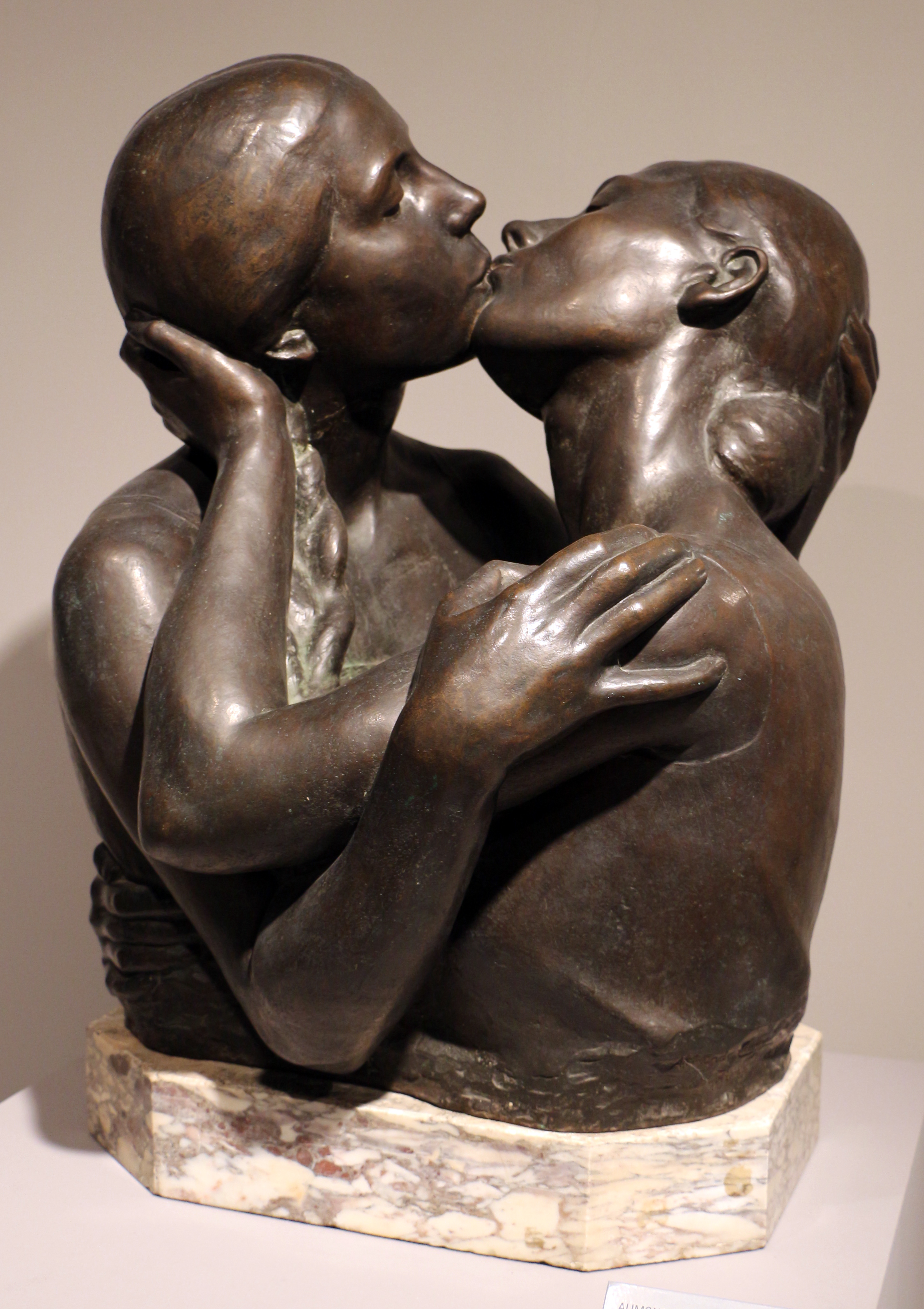 Il parco e i musei di Nervi This is a photo of a monument which is part of cultural heritage of Italy.